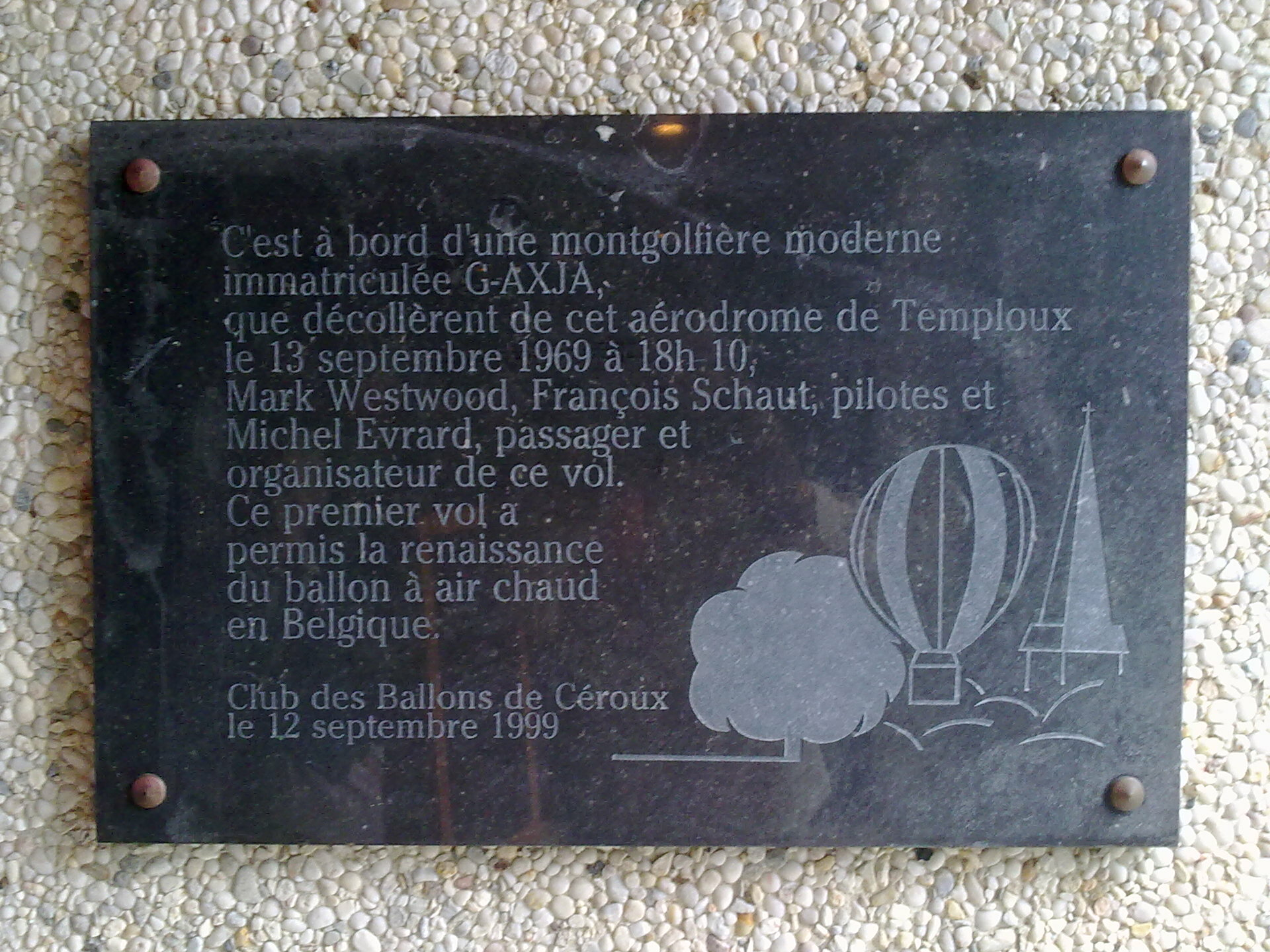 Plaque commémorative du premier vol en Montgolfière depuis l'aérodrôme de Temploux (Province de Namur-Belgique) le 13 septembre 1969.